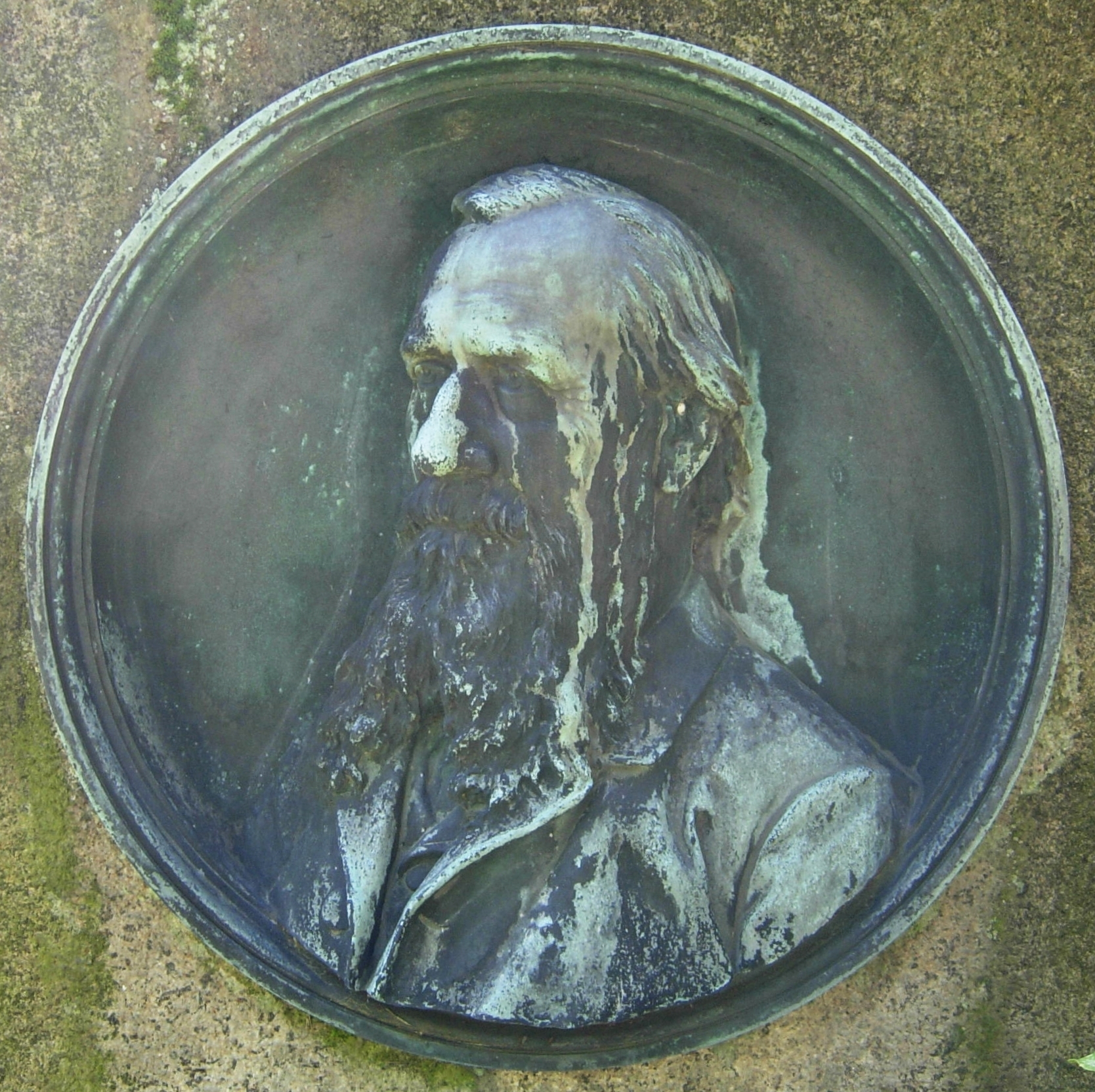 Albert Küppers: Bronze-Medaillon (1904) des Geologen und Oberberghauptmanns August Huyssen (* 28. April 1824 in Nymwegen, † 2. Dezember 1903 in Bonn) auf dem Poppelsdorfer Friedhof in Bonn; Huyssen studierte in Halle und Berlin Rechts- und Staatswissenschaften, Mathematik und Naturwissenschaften. Er wurde 1861 Berghauptmann in Breslau, 1864 in Halle, 1884 Oberberghauptmann und Leiter der preußischen Bergverwaltung (Ministerialdirektor der Abteilung für das Berg-, Hütten- und Salinenwesen im Handelsministerium, Nachfolger Albert Serlos) in Berlin; nach seiner Pensionierung 1891 zog er nach Bonn und wurde 1893 Mitglied der Leopoldina (der Deutschen Akademie der Naturforscher); eine Quelle: Matschoss, Conrad, Männer der Technik, ein biographisches Handbuch, 1925